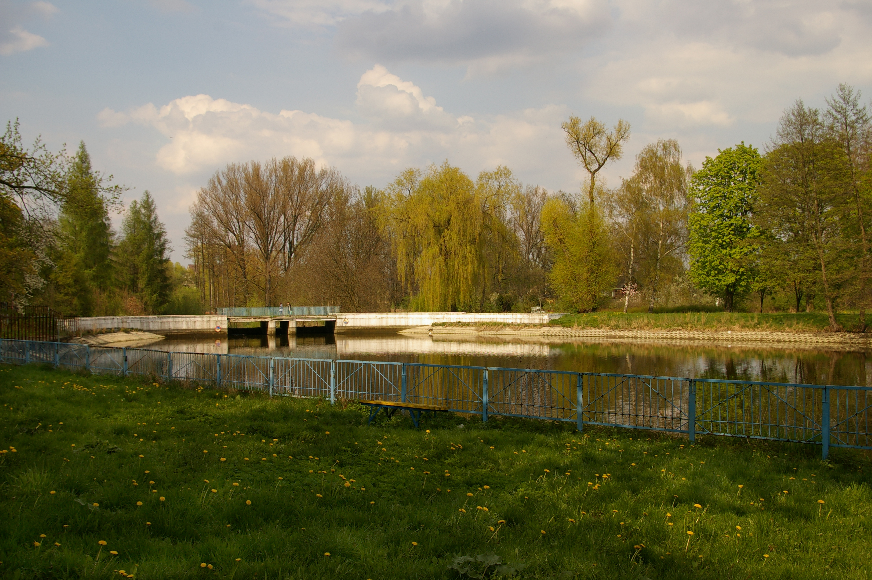 Stawy Stefańskiego, Park im. 1 Maja, Łódź